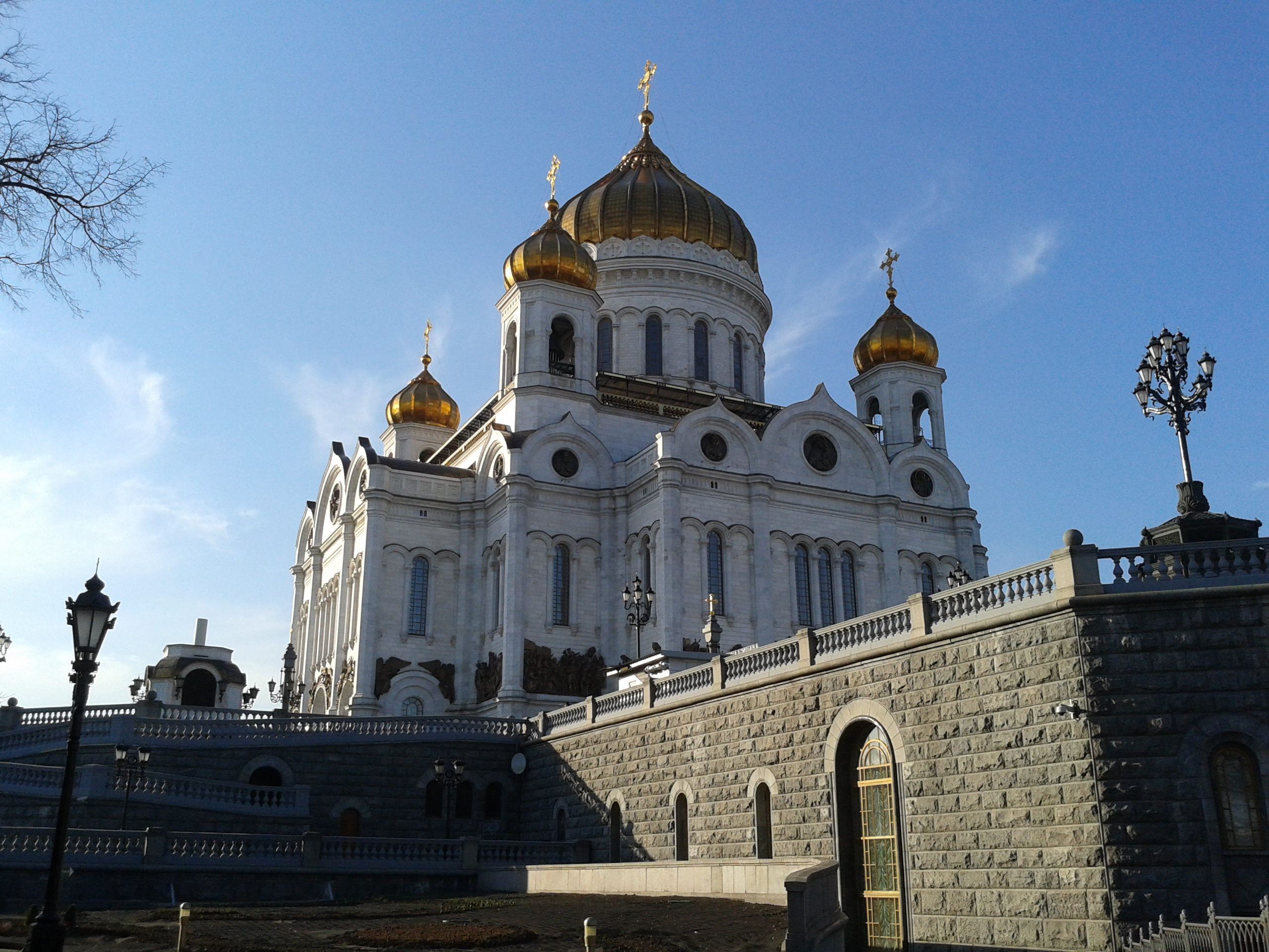 Храм Христа Спасителя, Москва. Вид из сквера часовни Державной иконы Божией Матери